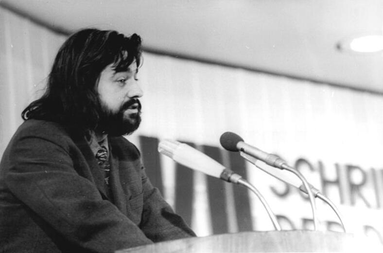 Berlin, VII. Schriftstellerkongress, Rede Becker ADN-ZB Katscherowski 15.11.73 Berlin: VII. Schriftstellerkongreß Der Schriftsteller Jurek Becker bei seinem Diskussionsbeitrag. Abgebildete Personen: Becker, Jurek: Schriftsteller, DDR